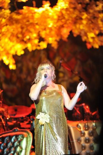 Cemiz Topuzlu Konser Salonu'ndan Sezen Aksu konserinden bir görünüm, 2012.